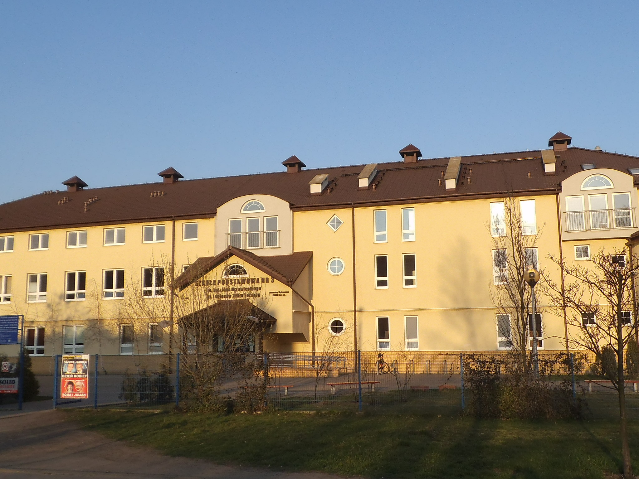 Szkoła podstawowa numer 3 w Toruniu